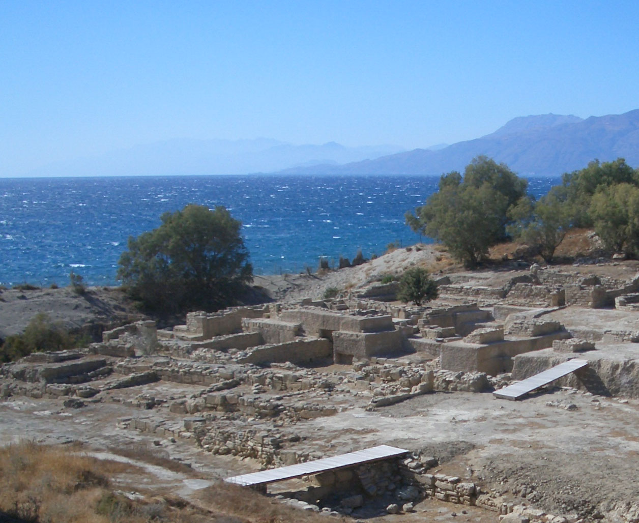 Ausgrabungsgelaende von Kommos